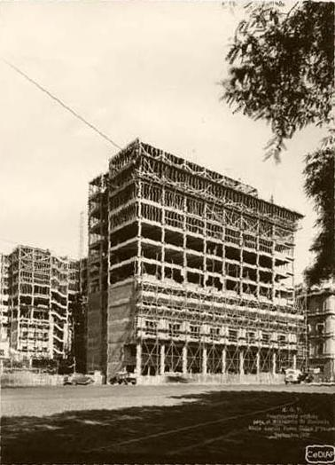 Vista de las obras del Palacio de Hacienda (hoy Ministerio de Economía y Finanzas Públicas) en 1937. Buenos Aires, Argentina.